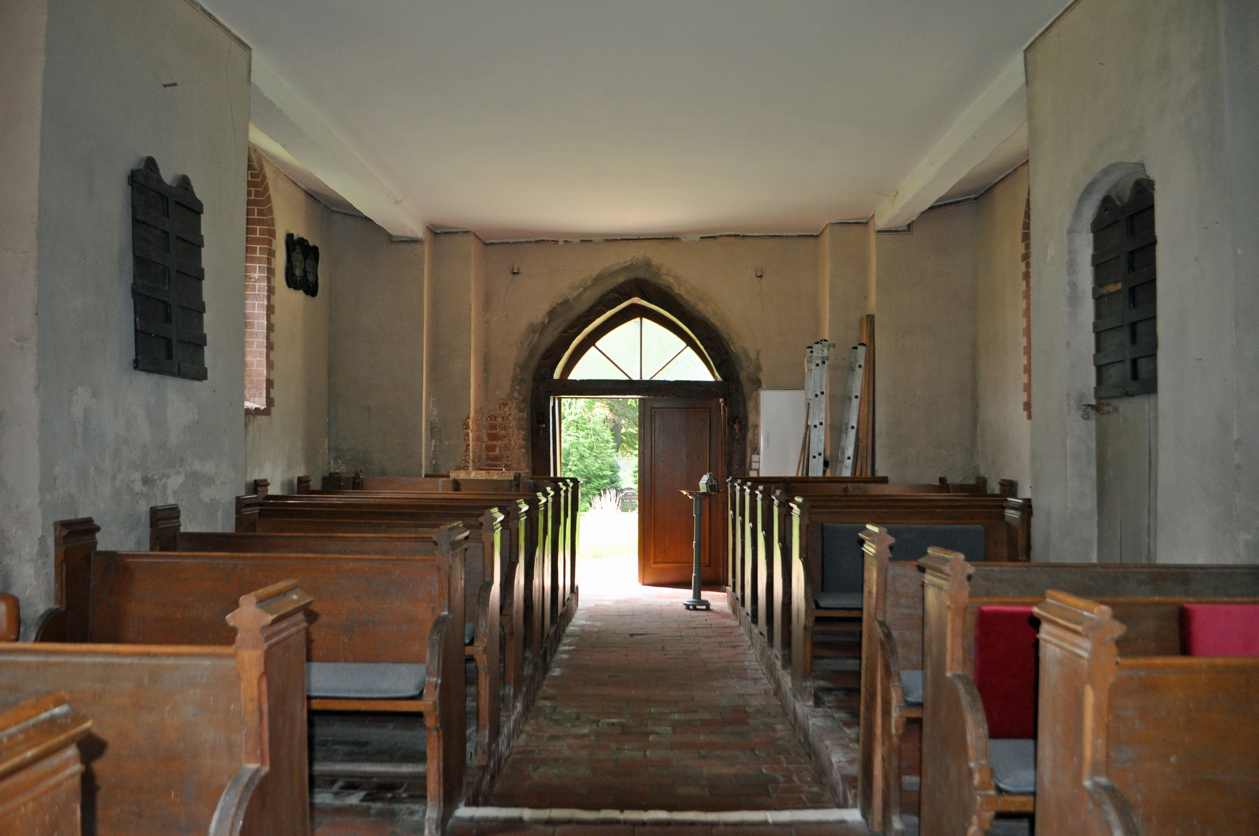 siehe Dateiname! Blick vom Altar in den Raum